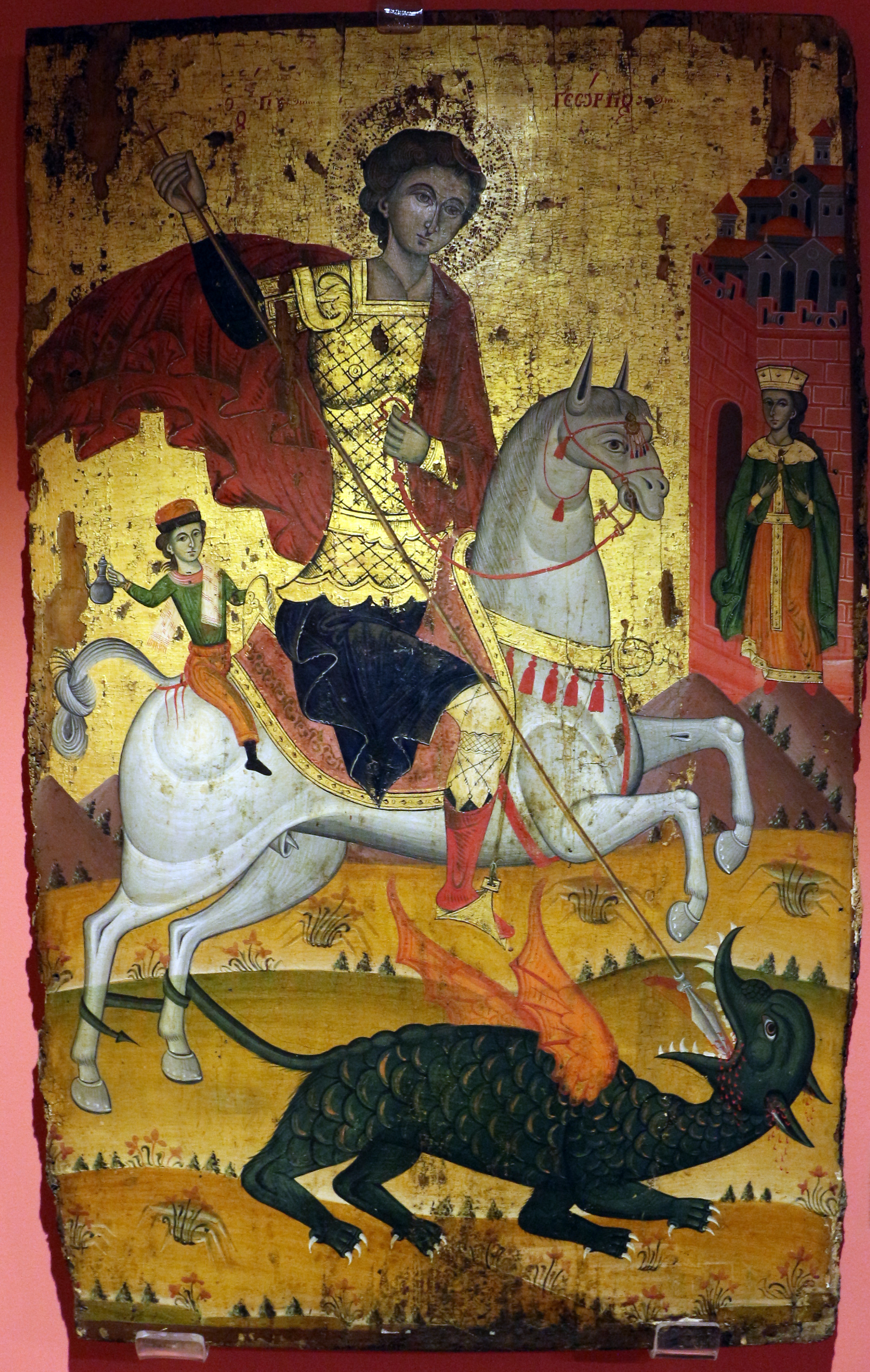 Muzeu Historik Kombëtar